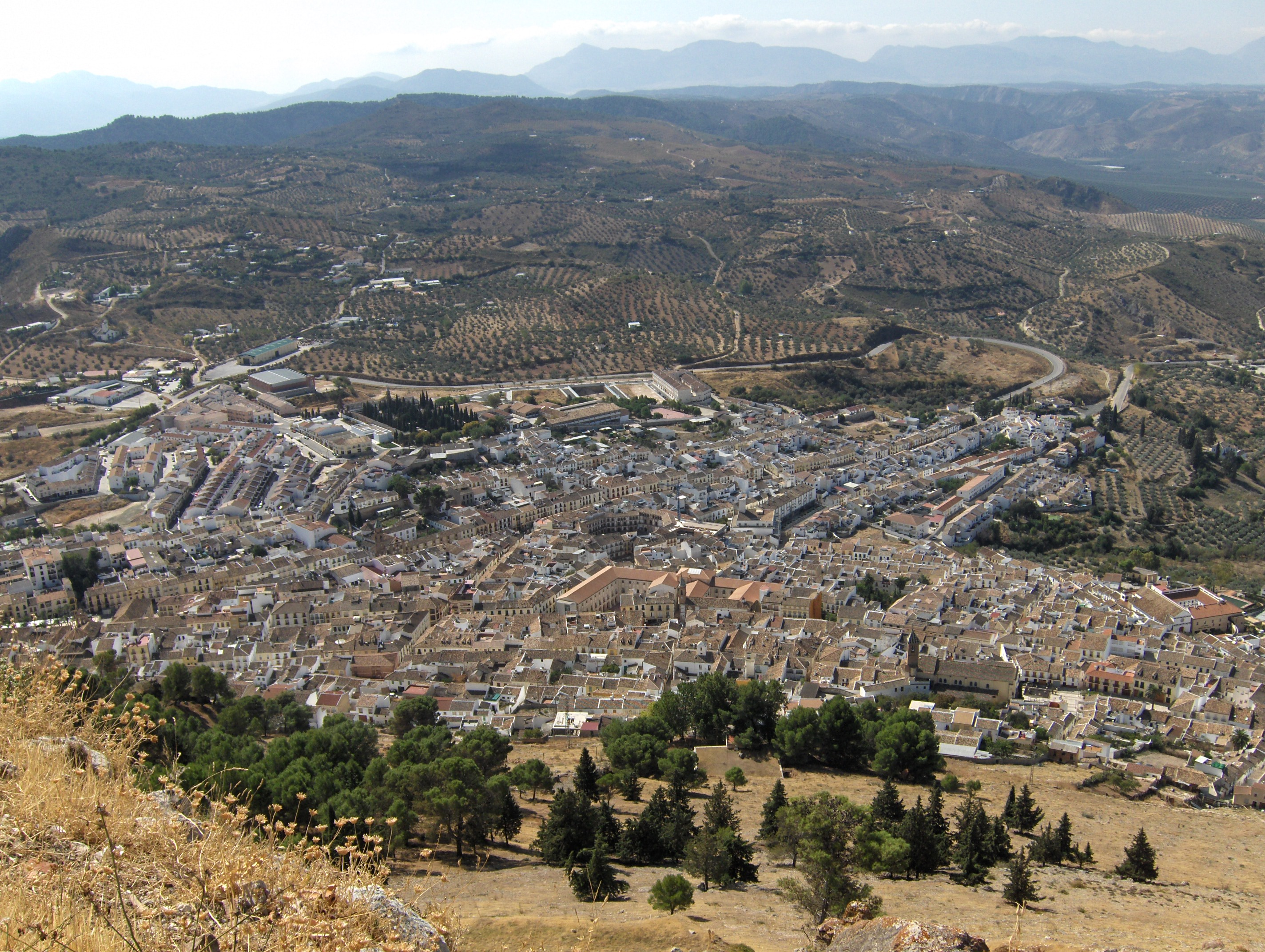 Casco antiguo de Archidona, España.